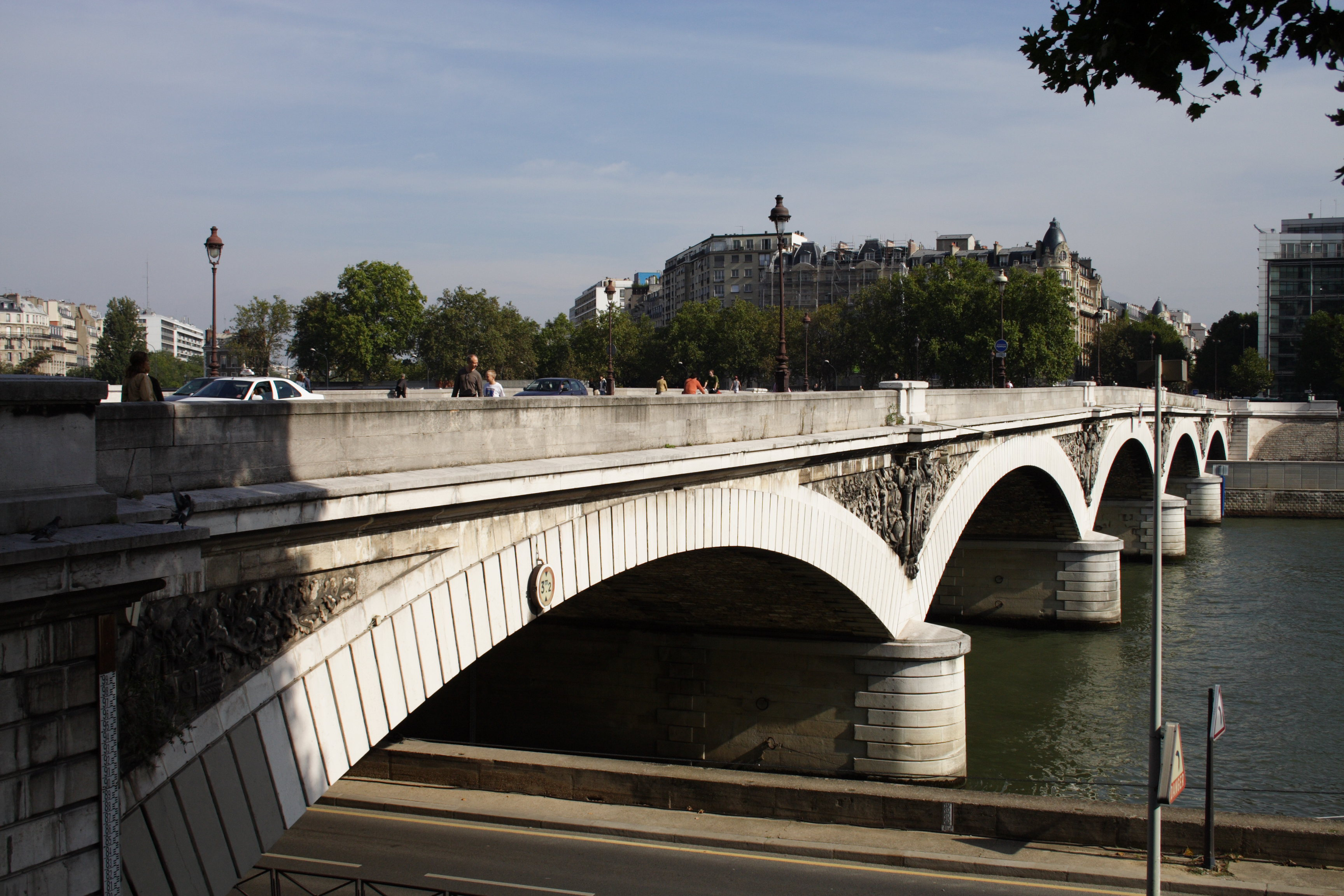 Pont d'Austerlitz(Paris, France)